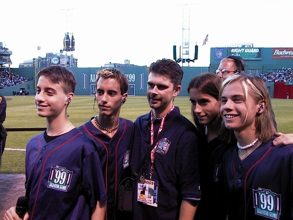 1999 beim All Star Game in Boston (Foto: Lars Wulff)